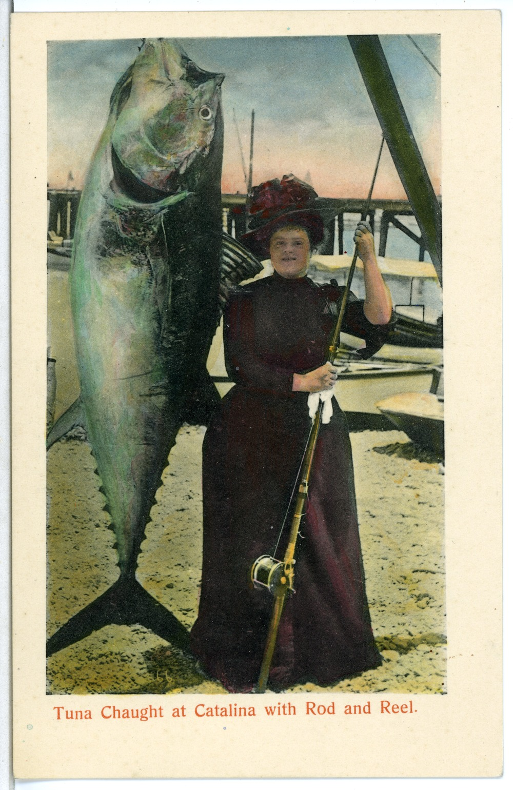 Catalina; Tuna chaught at Catalina with Rod and Reel [by Mrs. E. N. Dickerson, of New York, Weight, 216 pounds.] This postcard is from publisher Brück & Sohn in Meißen ( postcard has a unique number 04945 and is available in a higher resolution at the publisher. This images was uploaded in a cooperation project between Wikipedians and the publisher.